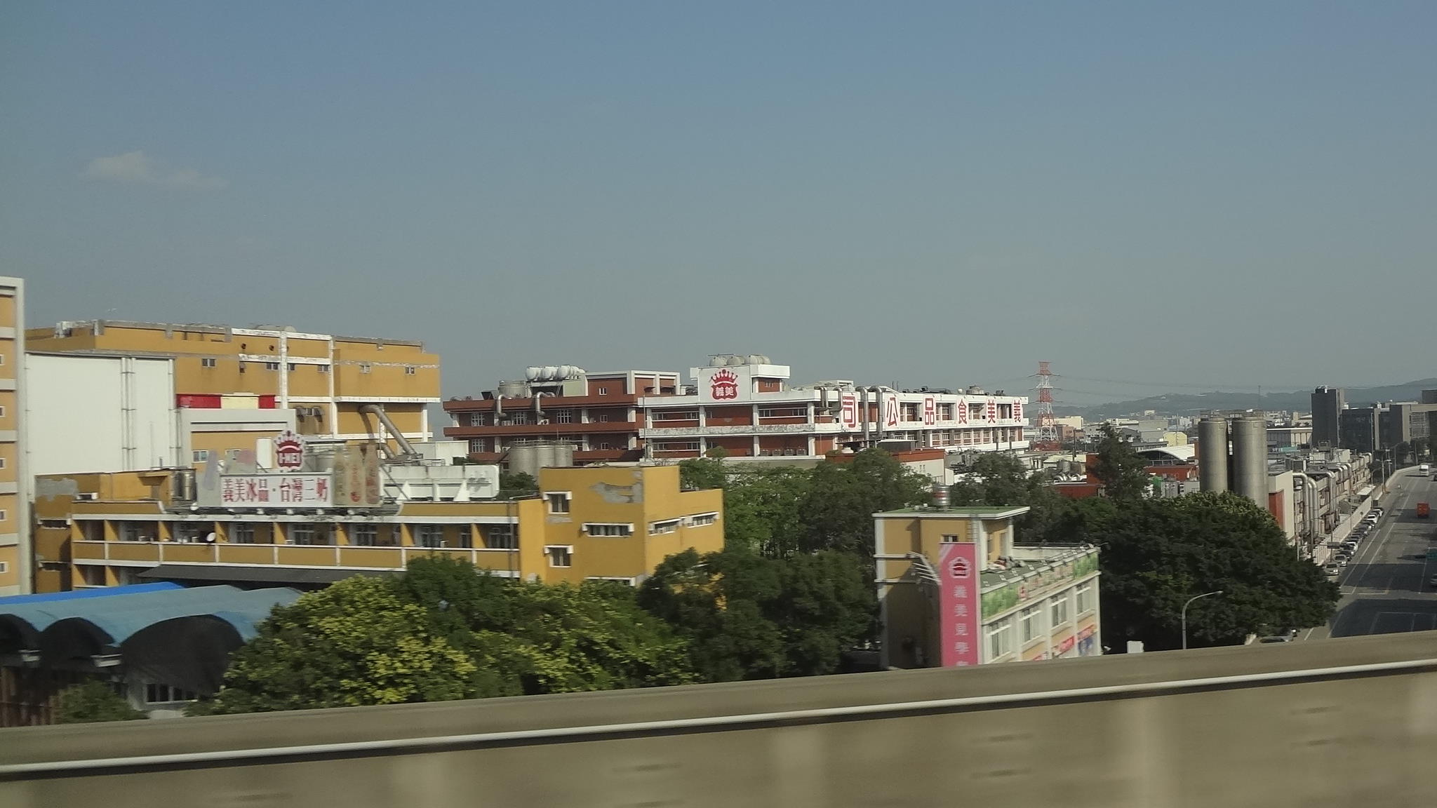 義美食品南崁廠，位於桃園縣蘆竹鄉南工路一段11號。拍攝於臺灣高鐵北上列車。